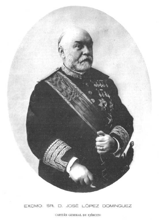 Jose Lopez Dominguez (1829-1911), militar y político español. Ocupó la presidencia del gobierno desde el 6 de julio de 1906 al 30 de noviembre de 1906.